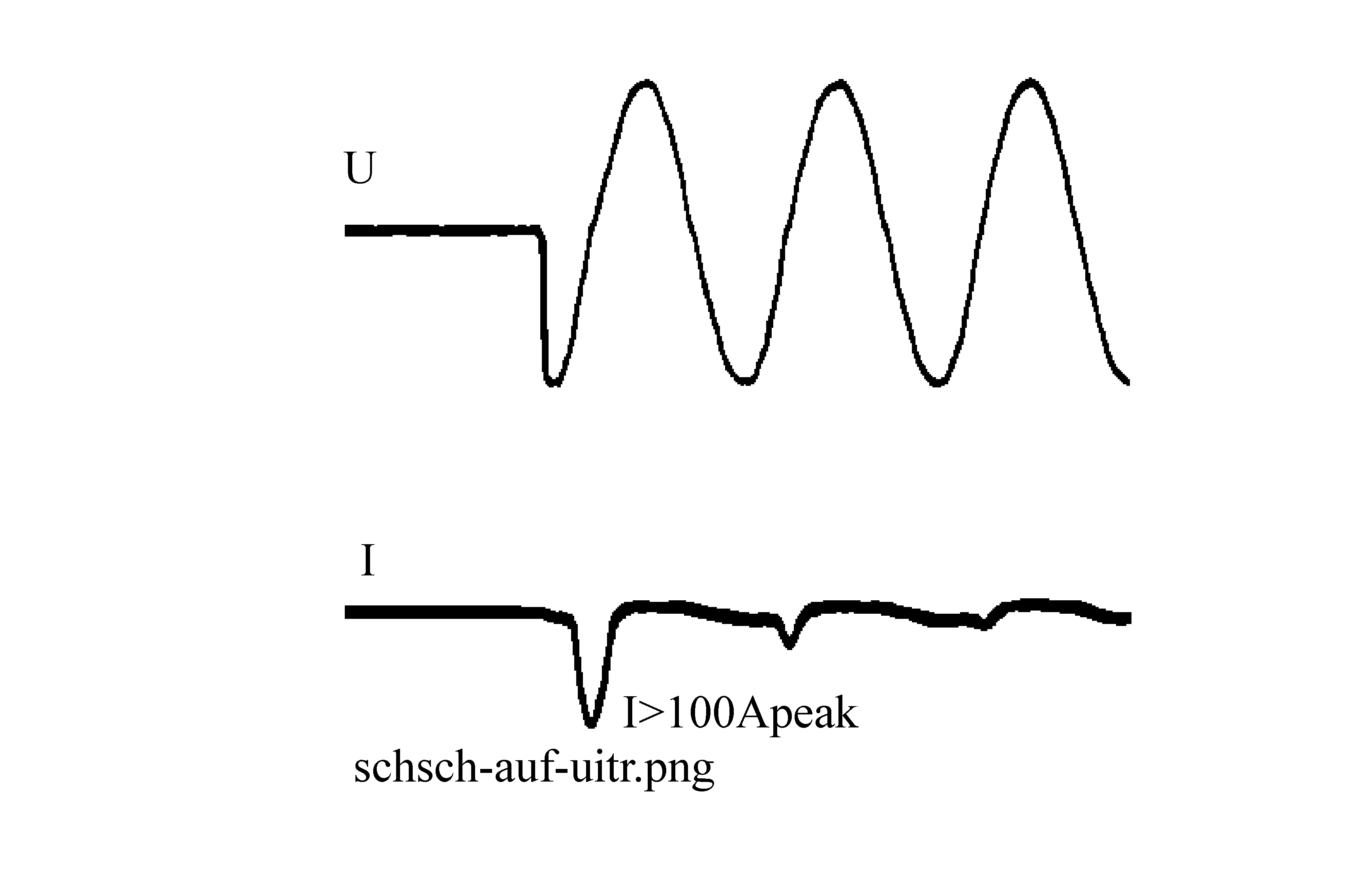 Messkurve vom Direkteinschalten eines Trafos